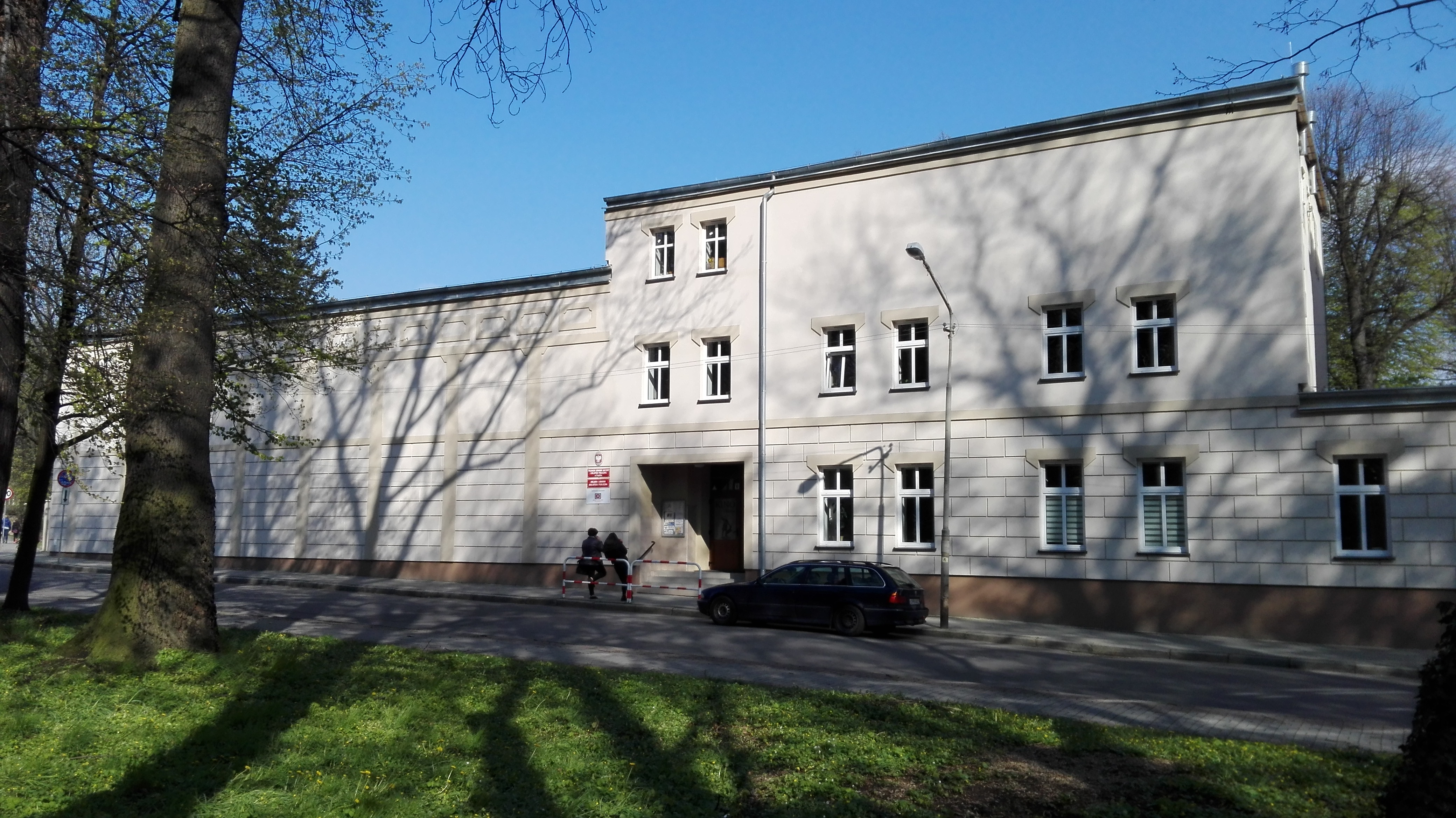 Prudnik, kino „Diana“, Biblioteka Publiczna Miejska i Gminna